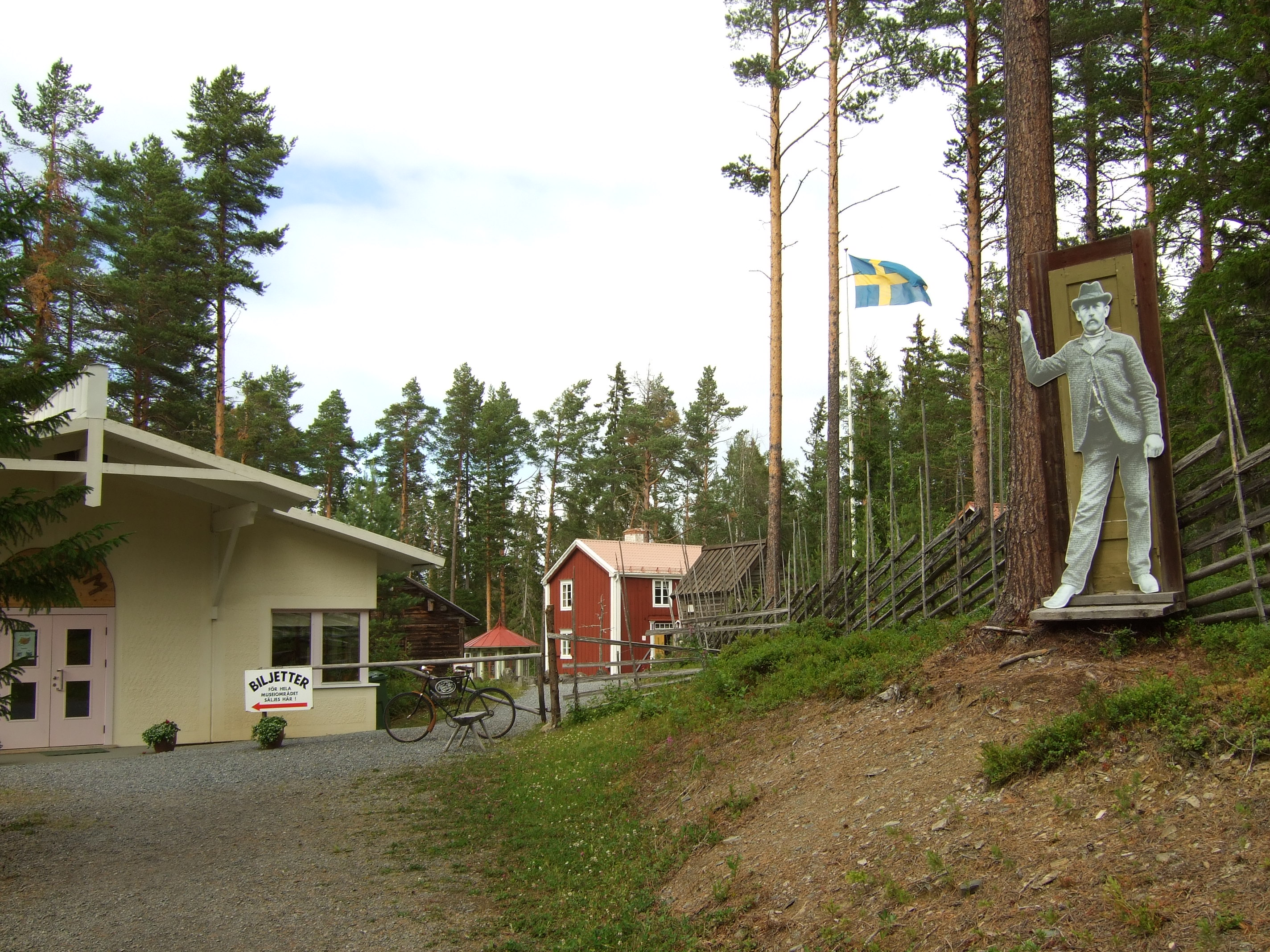 Mus-Olles museum, Jämtland, Sweden